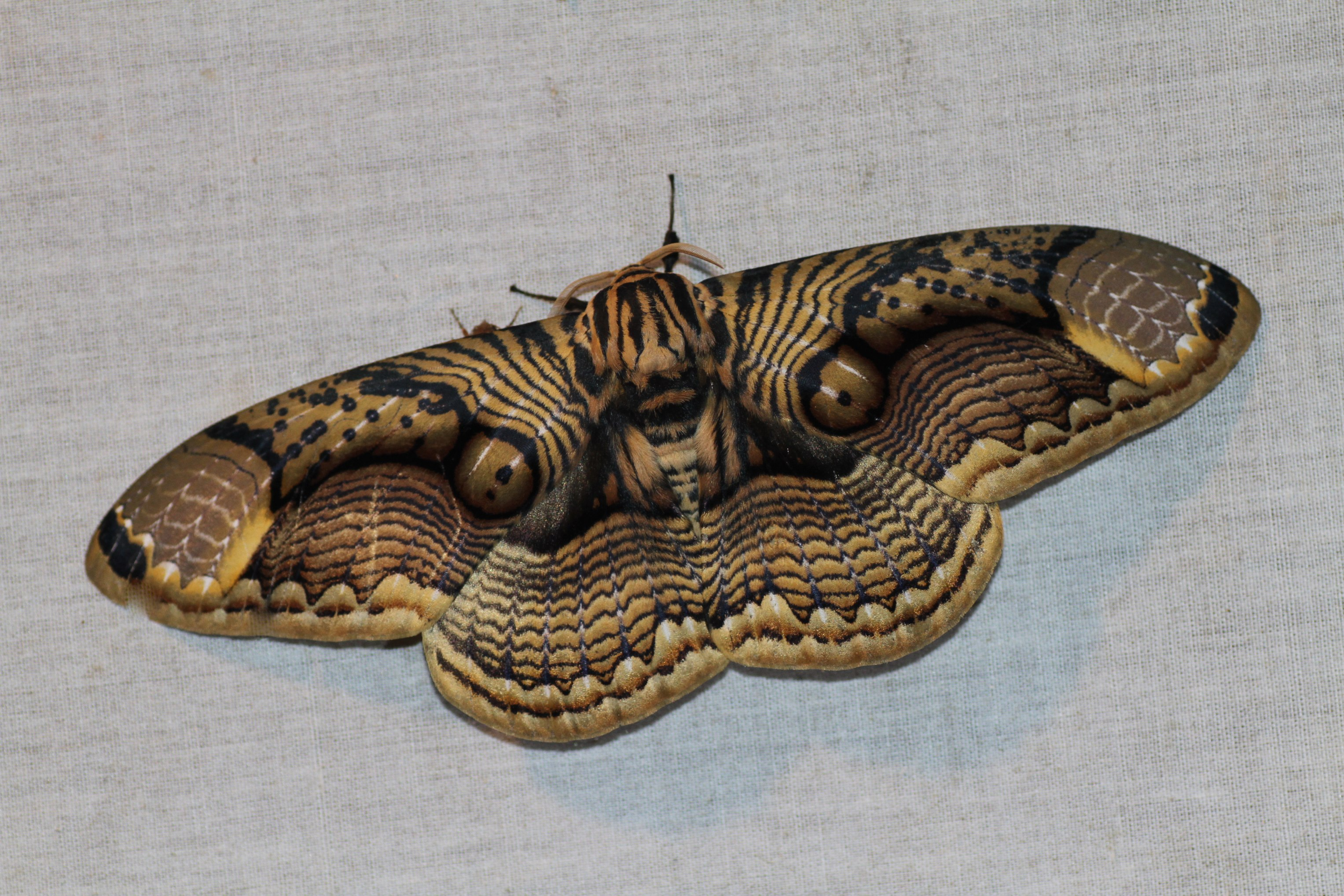 Borneo, Trusmadi area, 1150 m